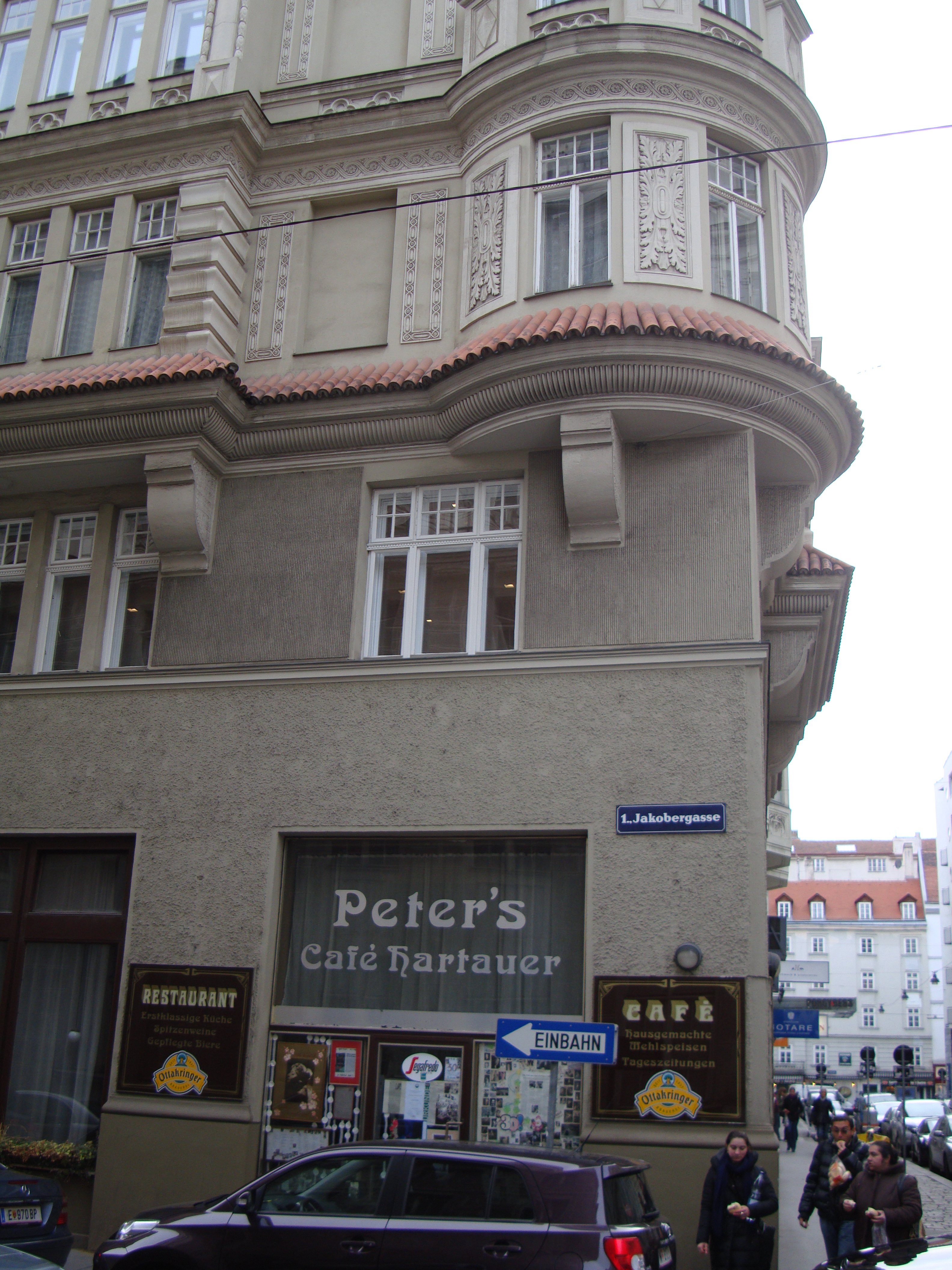 Riemergasse Operncafe